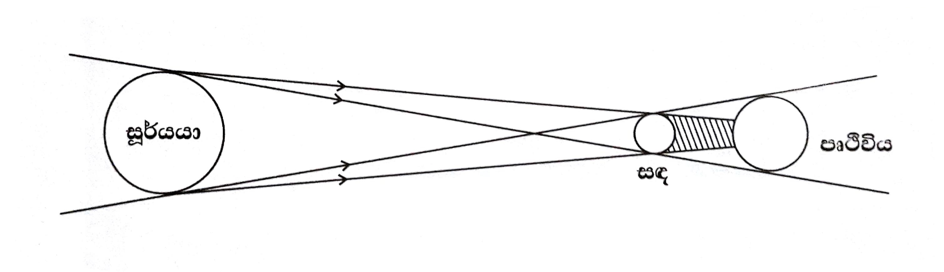 සිංහල: සූර්යග්‍රහණය